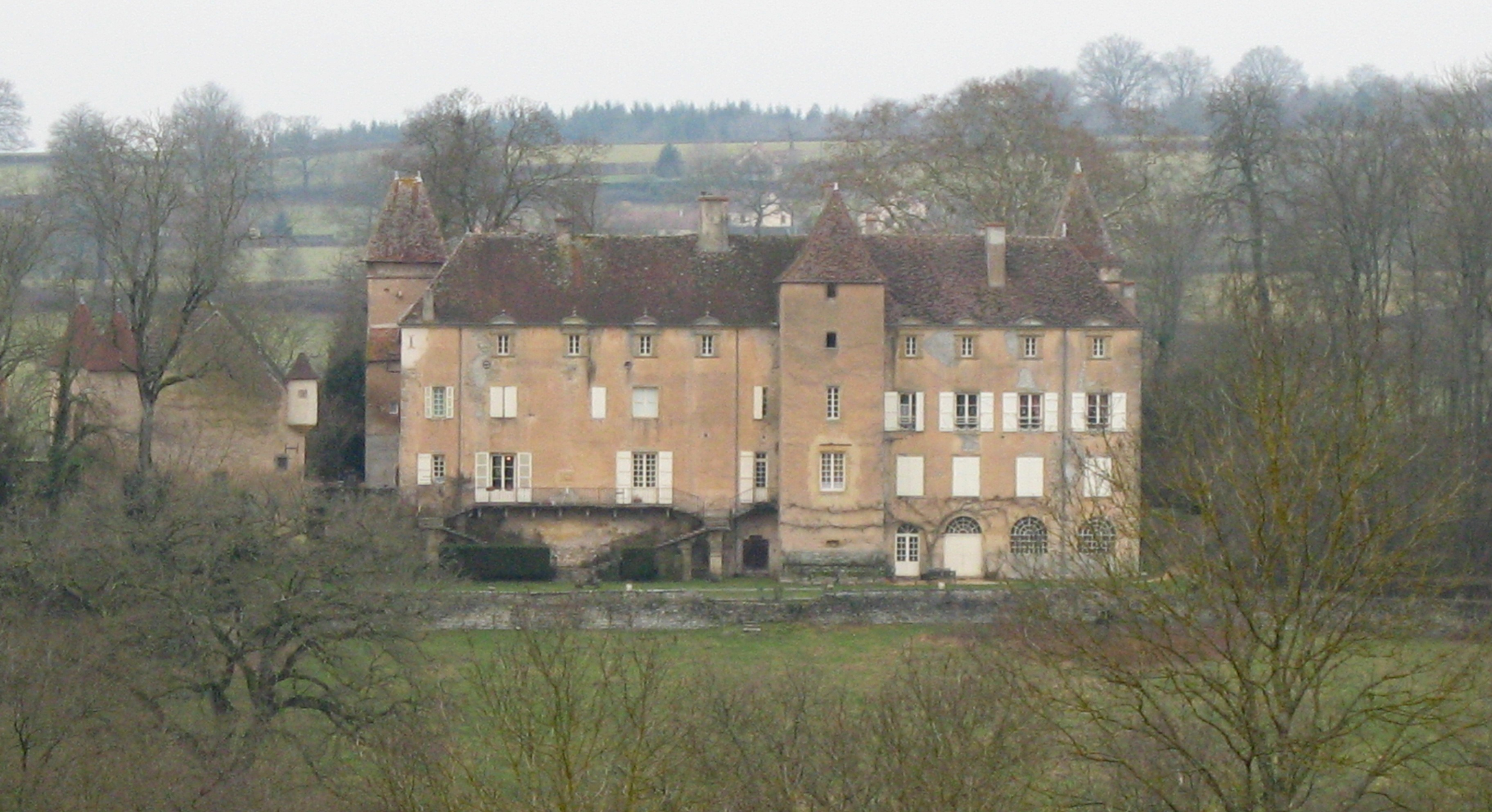 château de Molleron - Vaudebarrier (Saône-et-Loire)